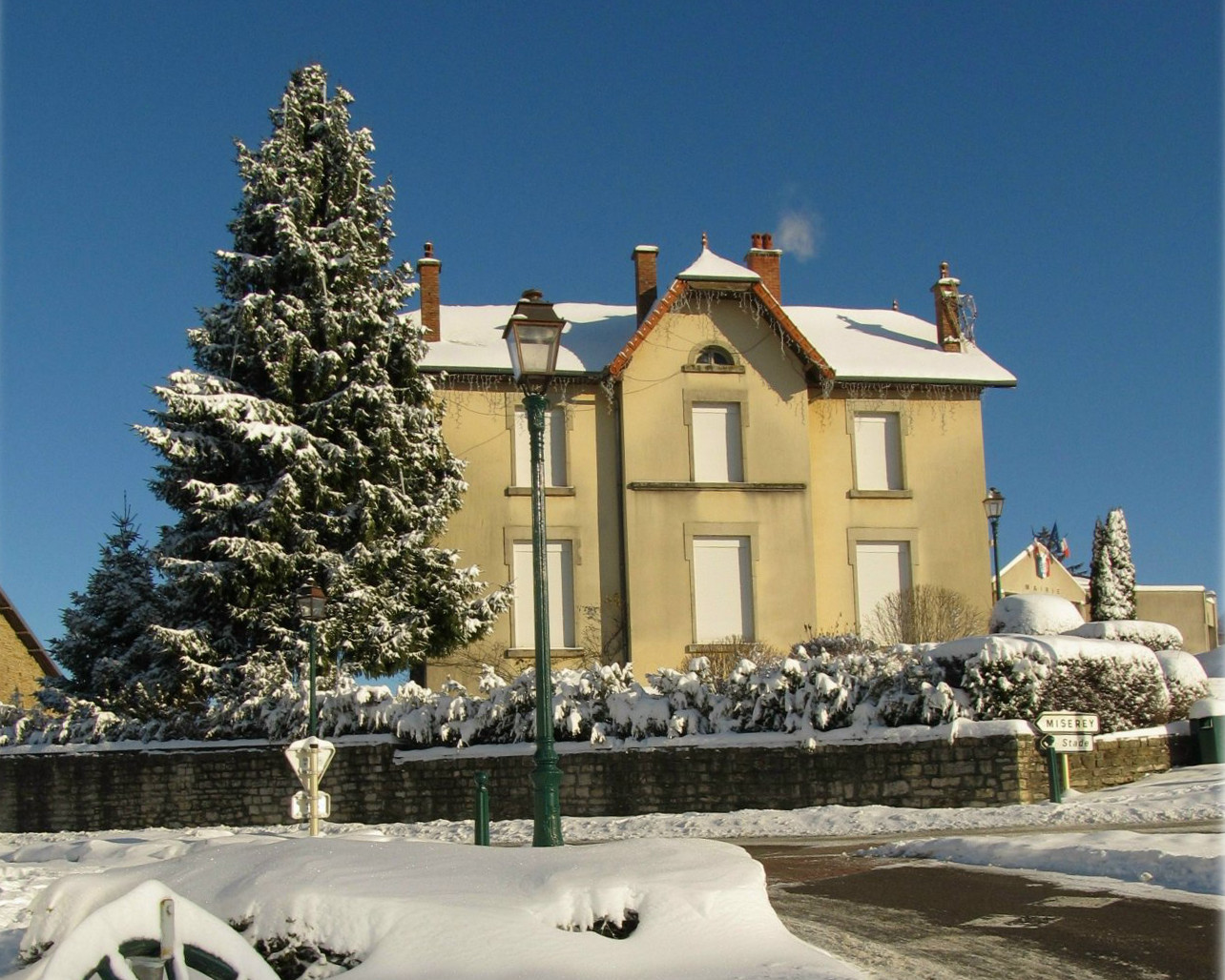 La mairie-école d'Ecole-Valentin a été construite en 1931-1933. L'école est transférée dans les nouveaux locaux du groupe scolaire Robert Delavaux dans les années 1970.